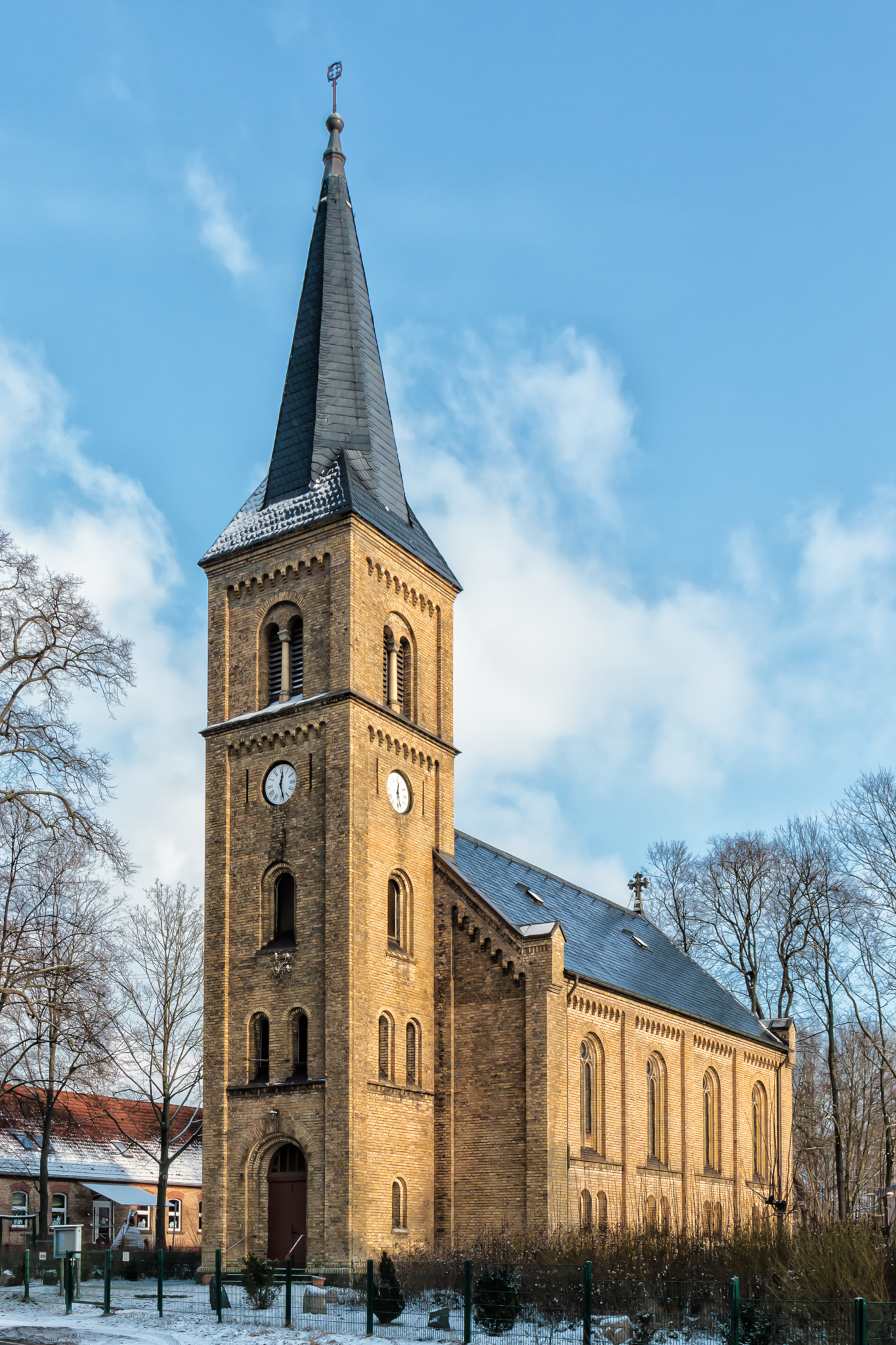 Oranienburg - Schmachtenhagen - Evangelische Kirche - 2013